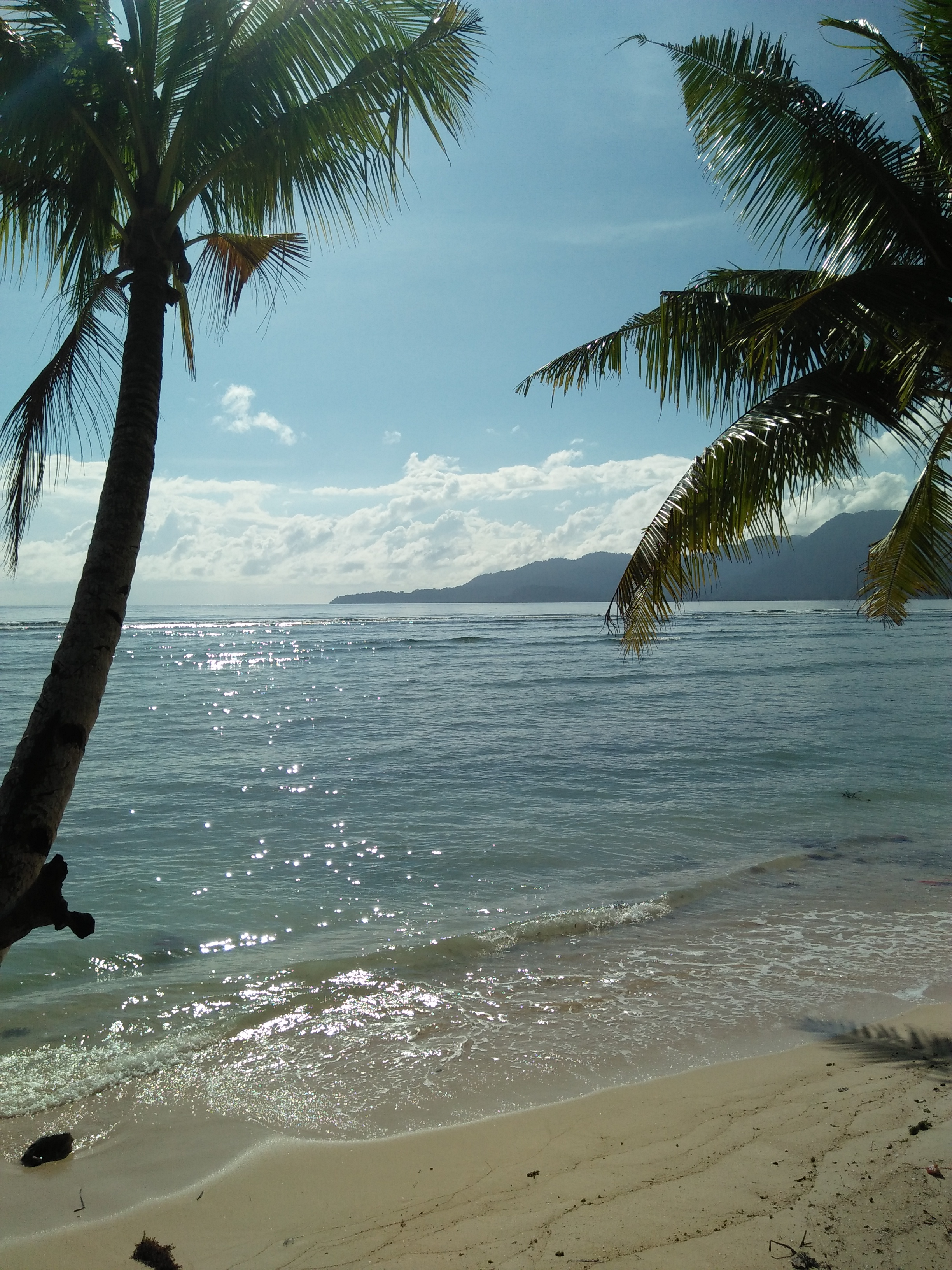 Salah satu sudut Pantai Pariem